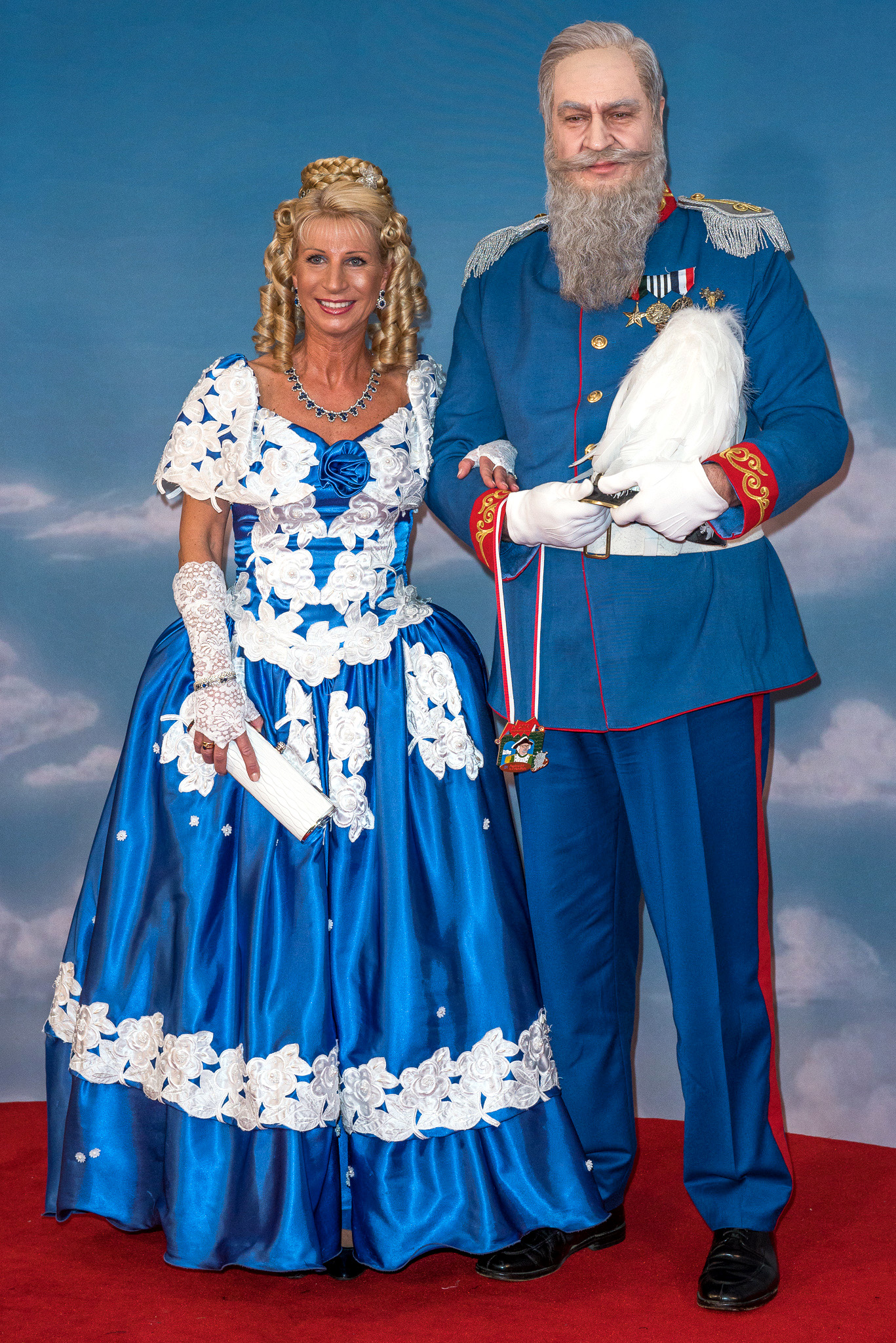 BR,Bayerisches Fernsehen,Fastnacht in Franken,Fastnachts-Verband Franken,Karin Baumüller-Söder,Karneval,Live-Sendung,Mainfrankensäle,Markus Söder